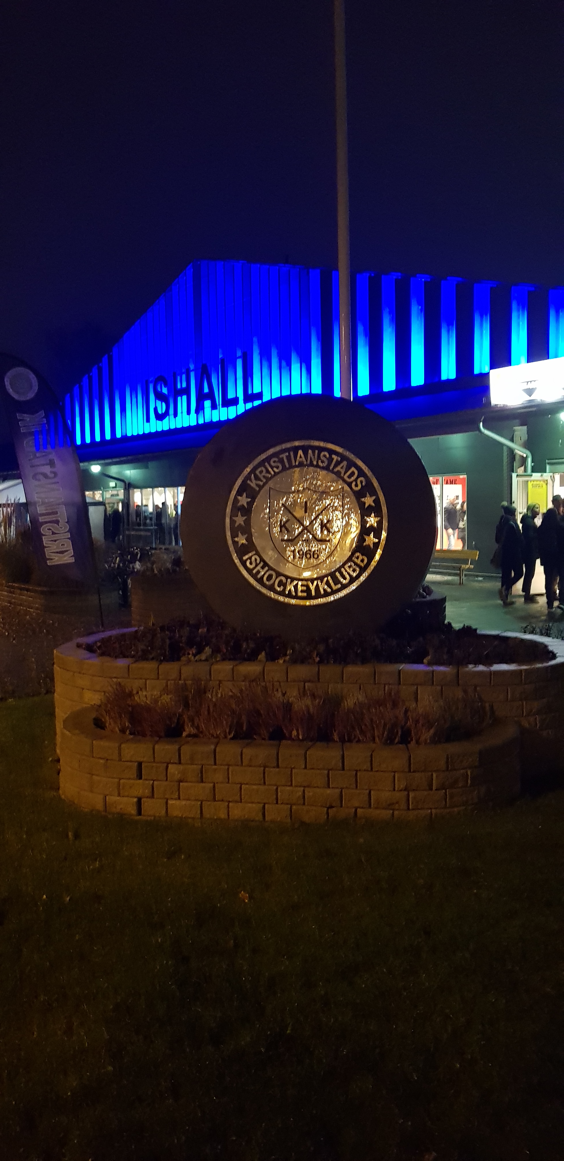 Kristianstads IK matchdag. Arenan